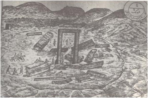 تصویری از نقش برجسته های سنگهای قصر ابونصر از کتاب آثار عجم نوشته فرصت الدوله شیرازی